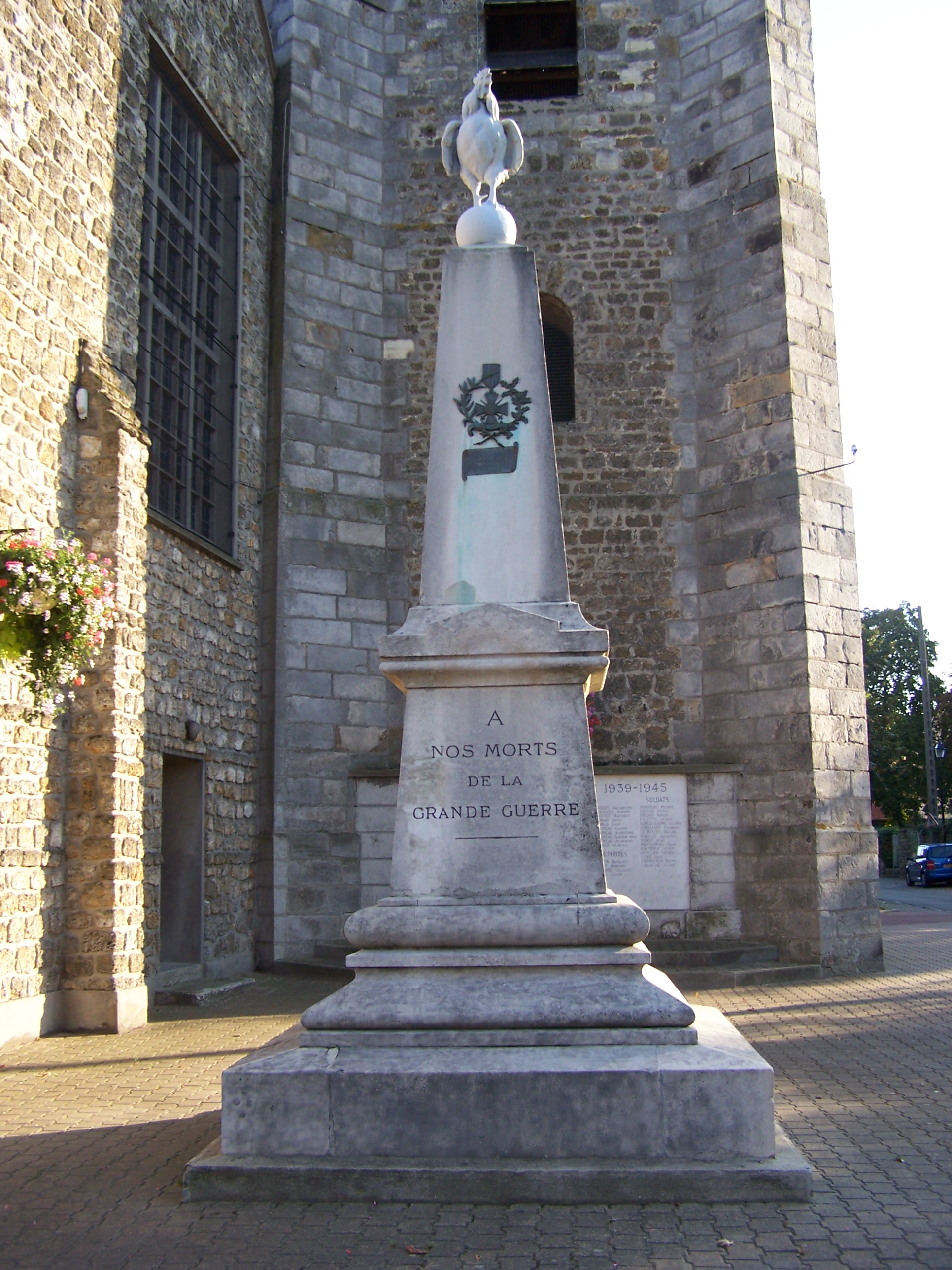 Momument aux morts de Trappes (Yvelines, France)